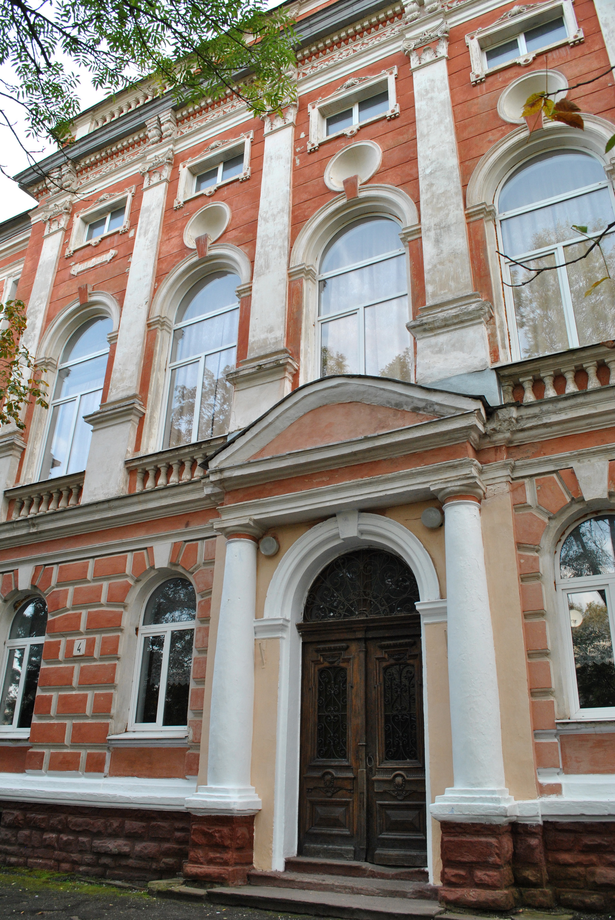 Пам'ятка архітектури місцевого значення в Бучачі на вул. Шкільній, 4: будинок колишньої гімназії, в якій навчався український етнограф, фольклорист, мовознавець, літературознавець, мистецтвознавець, перекладач та громадський діяч Володимир Гнатюк. Головний портал.